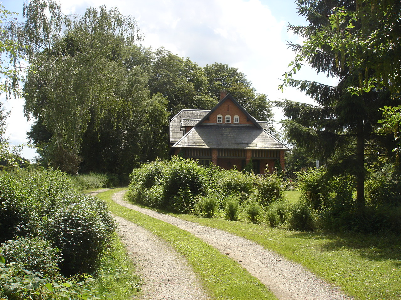 Døjringe Station